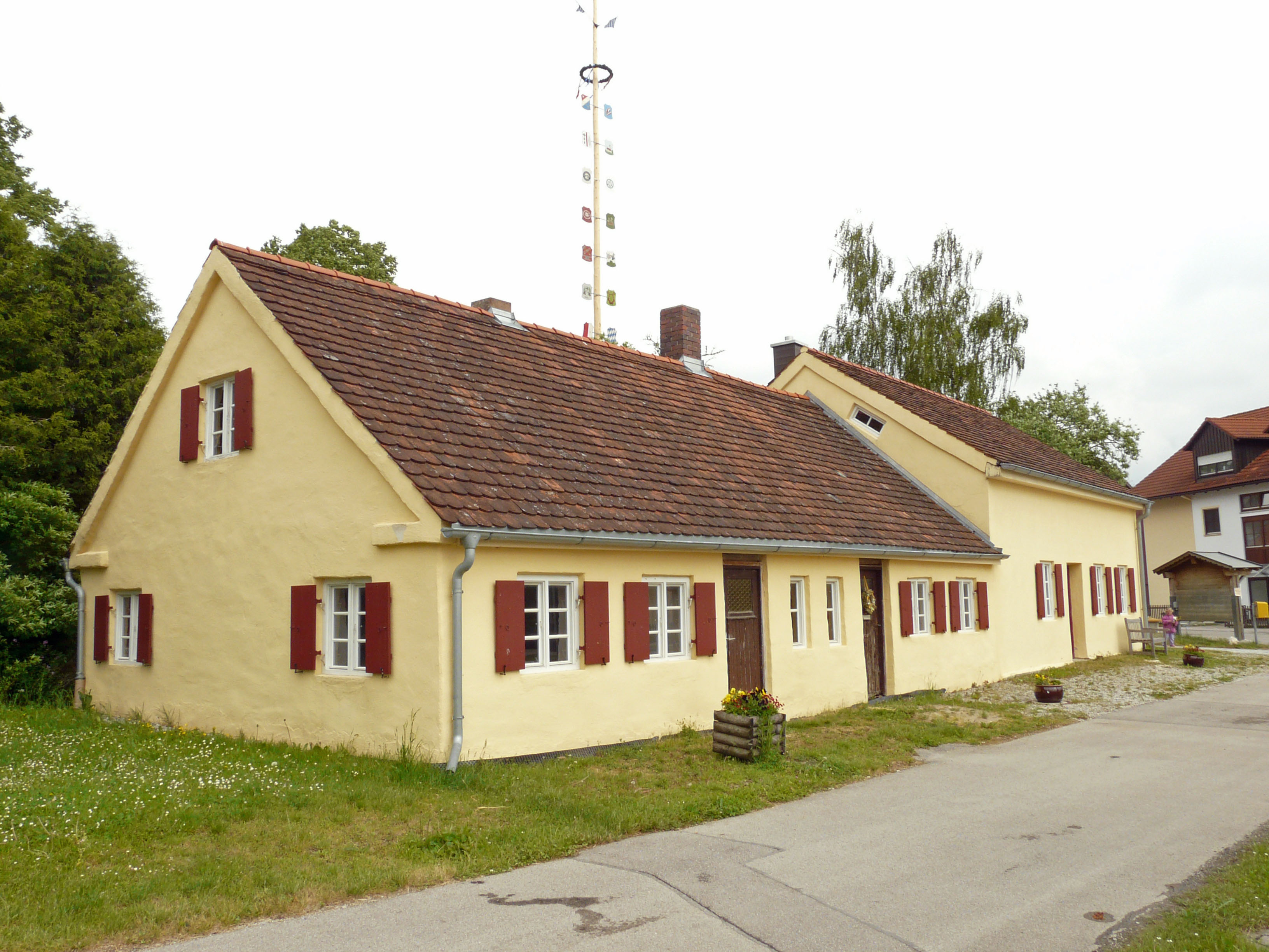 Ehem. Armenhaus in Lindenberg, Stadt Buchloe